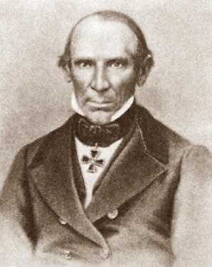 Русский философ, психолог Василий Николаевич Карпов (1798-1867)